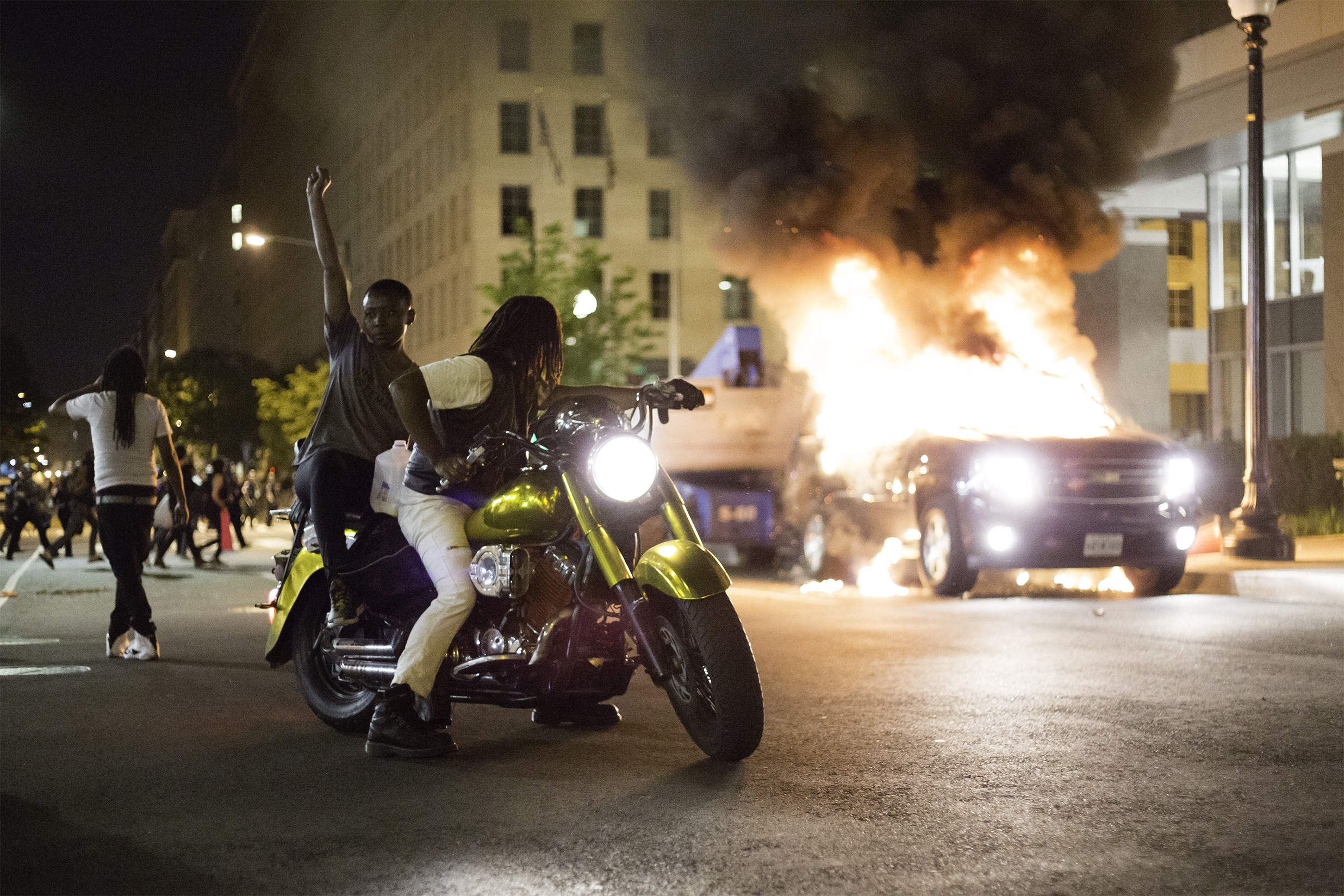 DC George Floyd Protest (I)